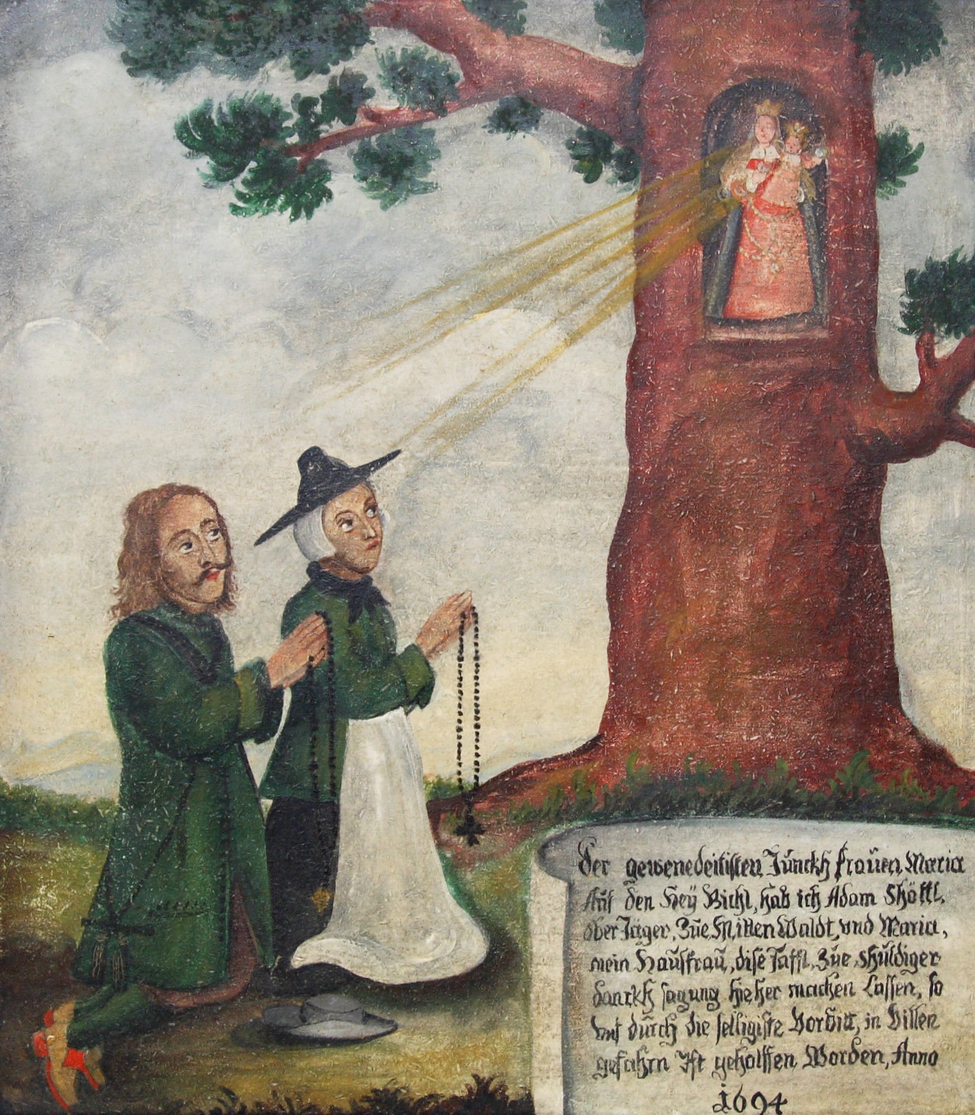 Votivtafel aus dem Jahr 1694 aus der Heuwinklkapelle in Iffeldorf. Die Tafel stammt aus der Zeit kurz vor Errichtung der Kapelle, als das Marienbild in einer hohlen Eiche aufgestellt war und zum Ziel zahlreicher Wallfahrer wurde. Nach Fertigstellung der Kapelle im Jahr 1701 wurde das Marienbild dort aufgestellt. Die Votivtafel hängt heute im Vorraum der Kapelle.